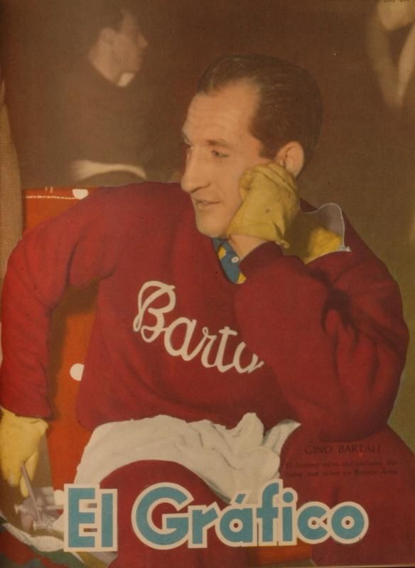 Coberta de la revista El Gráfico:Gino Bartali-1952